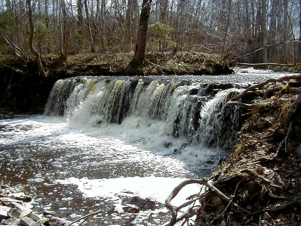 Rendas rumba 2000-04-15